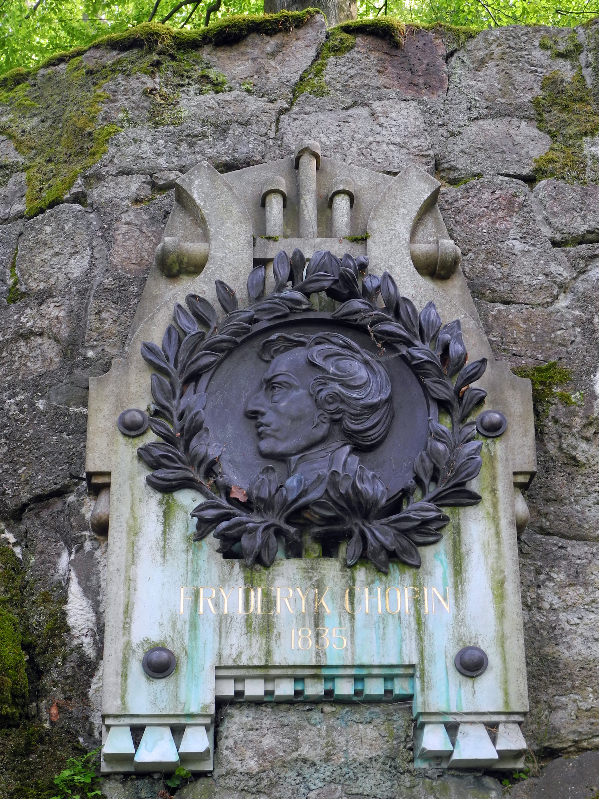 Chopin-Denkmal (1835) am Chopinweg im Stadtwald von Karlsbad (Karlovy Vary)